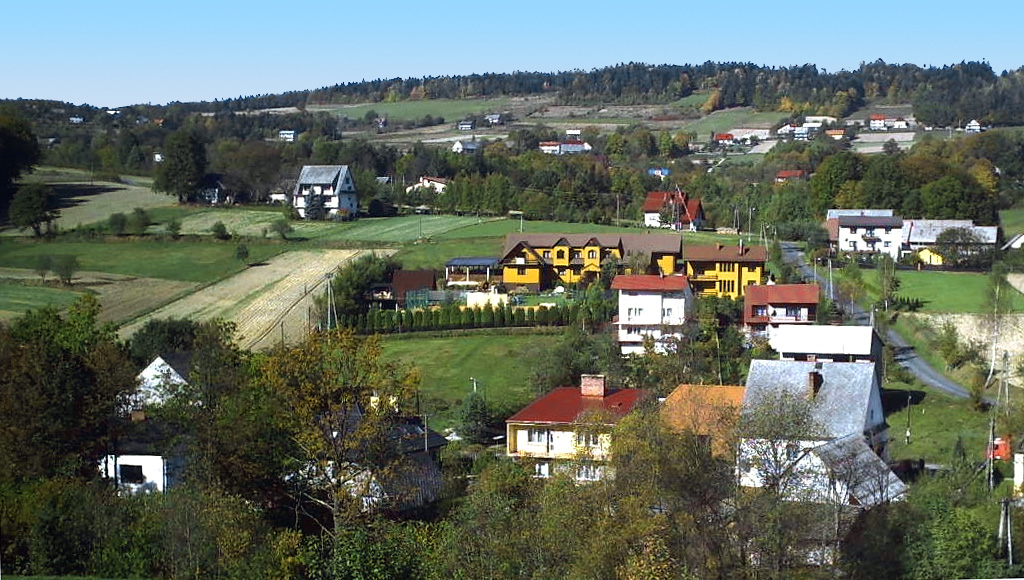 Marcówka widok ogólny ze zbocza powyżej szkoły.My own work.2006.Suwaj władysław.(Marcówka as seen from the slope above the school)